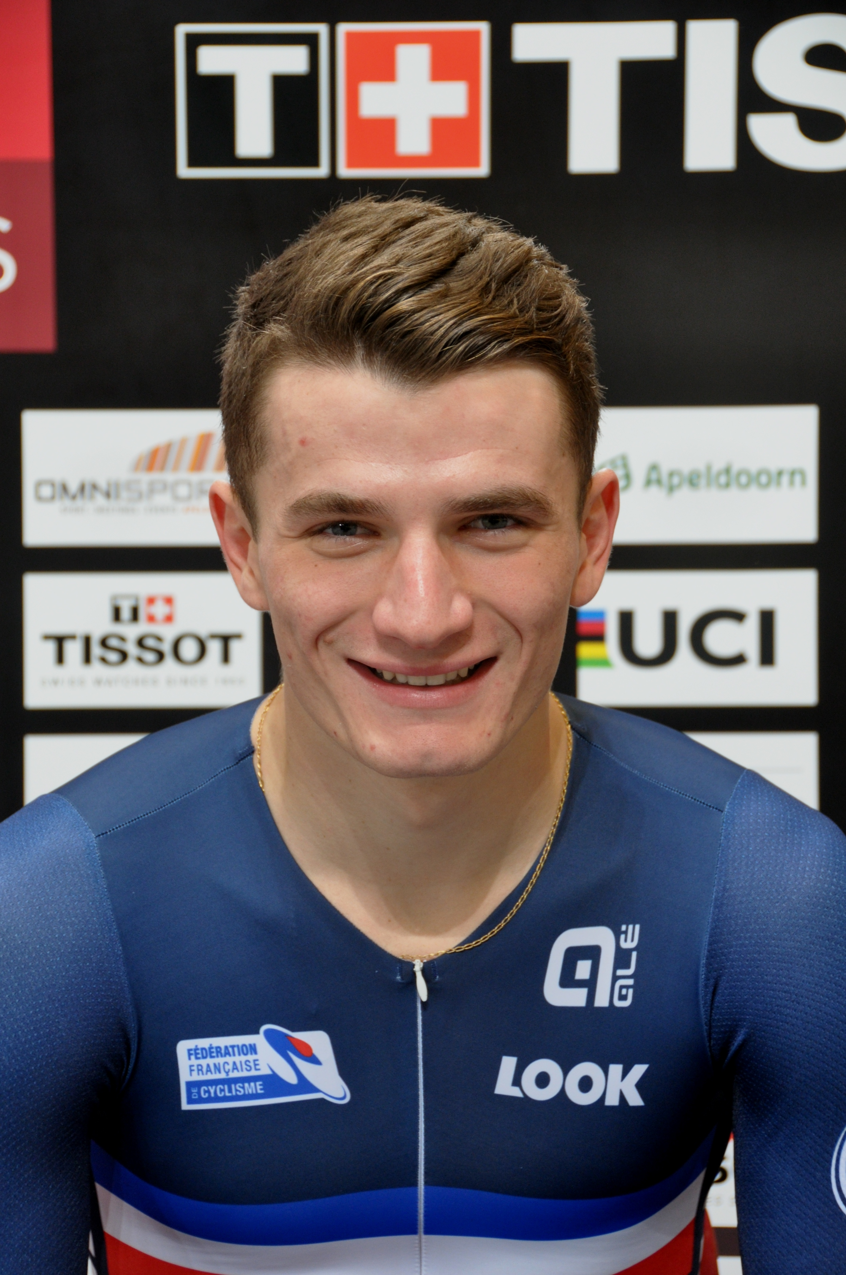 Adrien Garel, französischer Radsportler